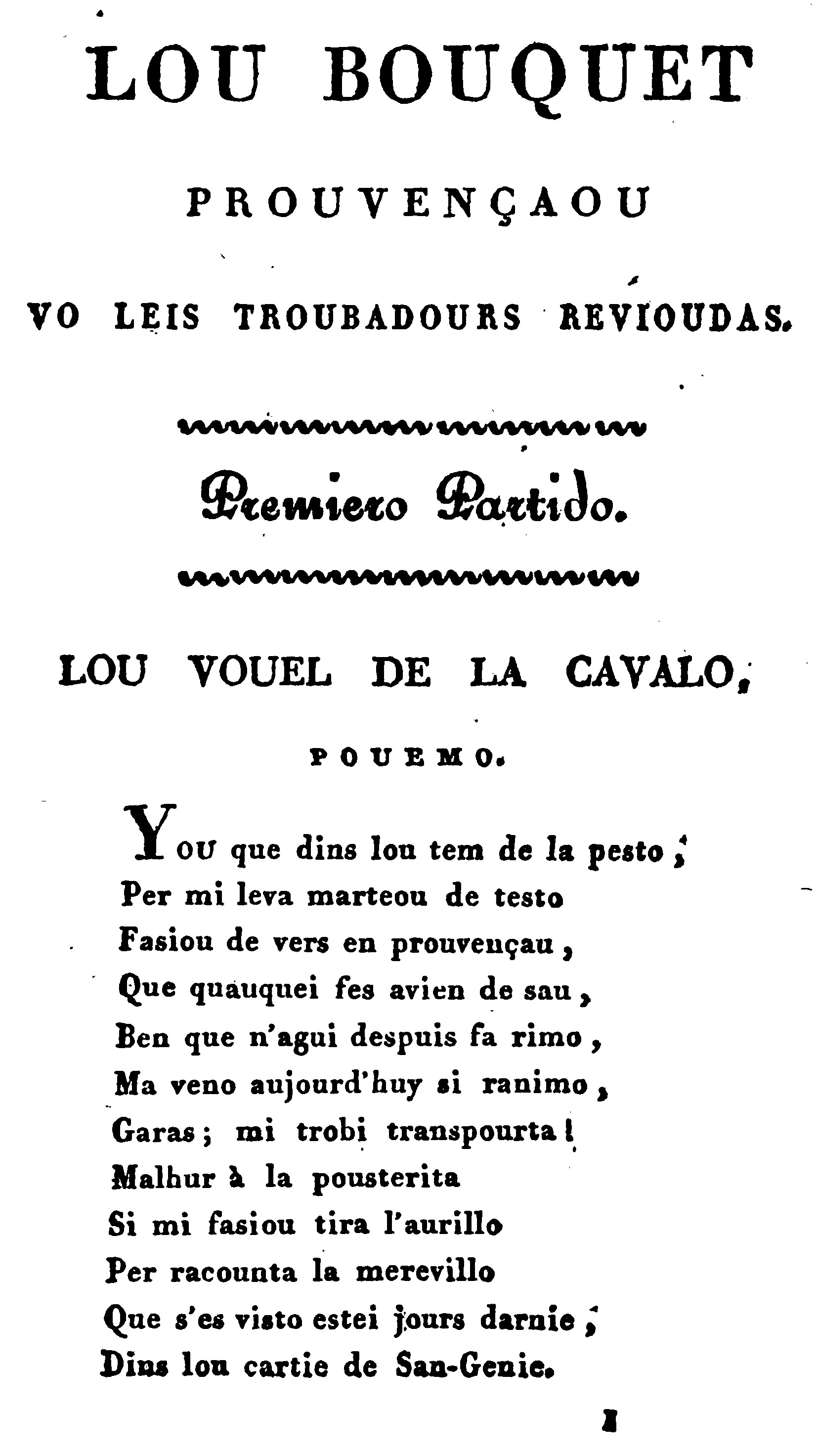 pagina dau Boquet provençau